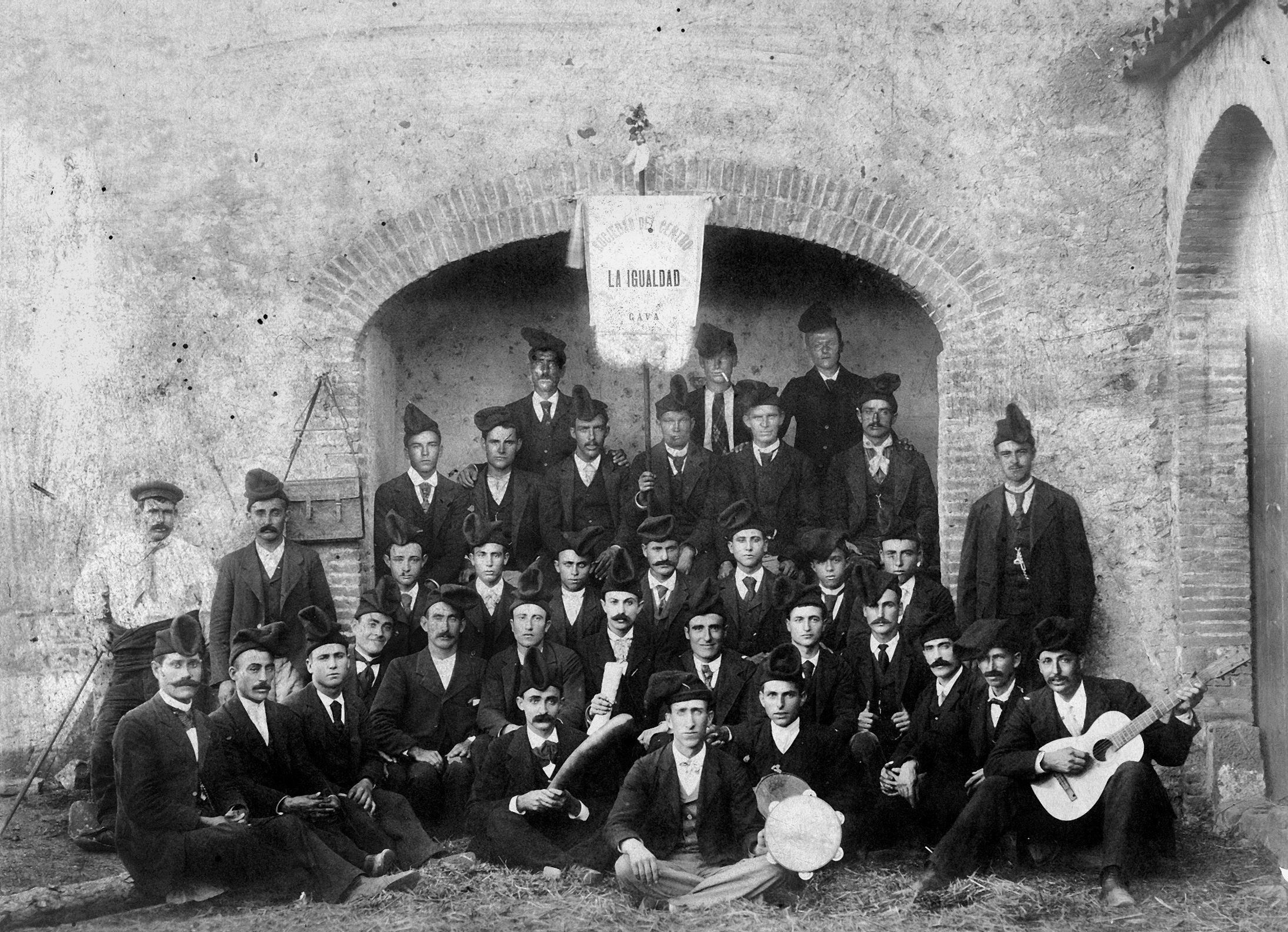 MUS SOCIETAT CORAL LA IGUALTAT A LA FASSICIA D'EN MOLINER